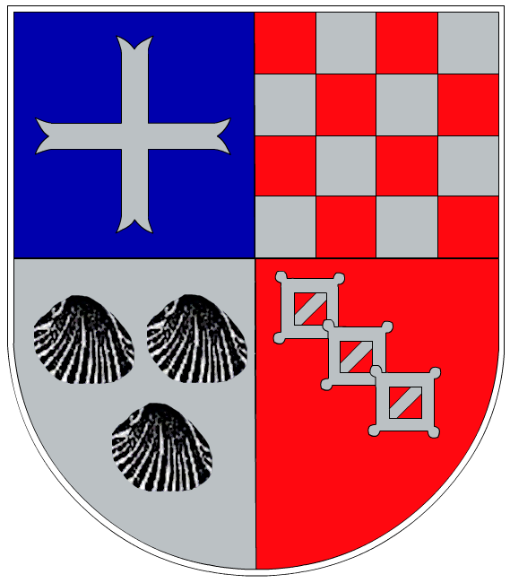 Wappen von Dommershausen